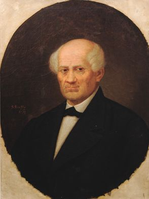 Sava Henţia - Portretul lui Alexandru Hâjdeu. Muzeul "Bogdan Petriceicu Hasdeu" - CÂMPINA. Portretul lui Alexandru Hasdeu - bust pe fond brun - la vârsta senectuţii, surprins din trei sferturi cu chipul răsucit spre privitor, părul alb, adus spre faţă, creştetul pleşuv, cu cămaşă albă, redingotă şi fundă neagră. Semnat şi datat la mijloc, spre stânga, cu roşu.